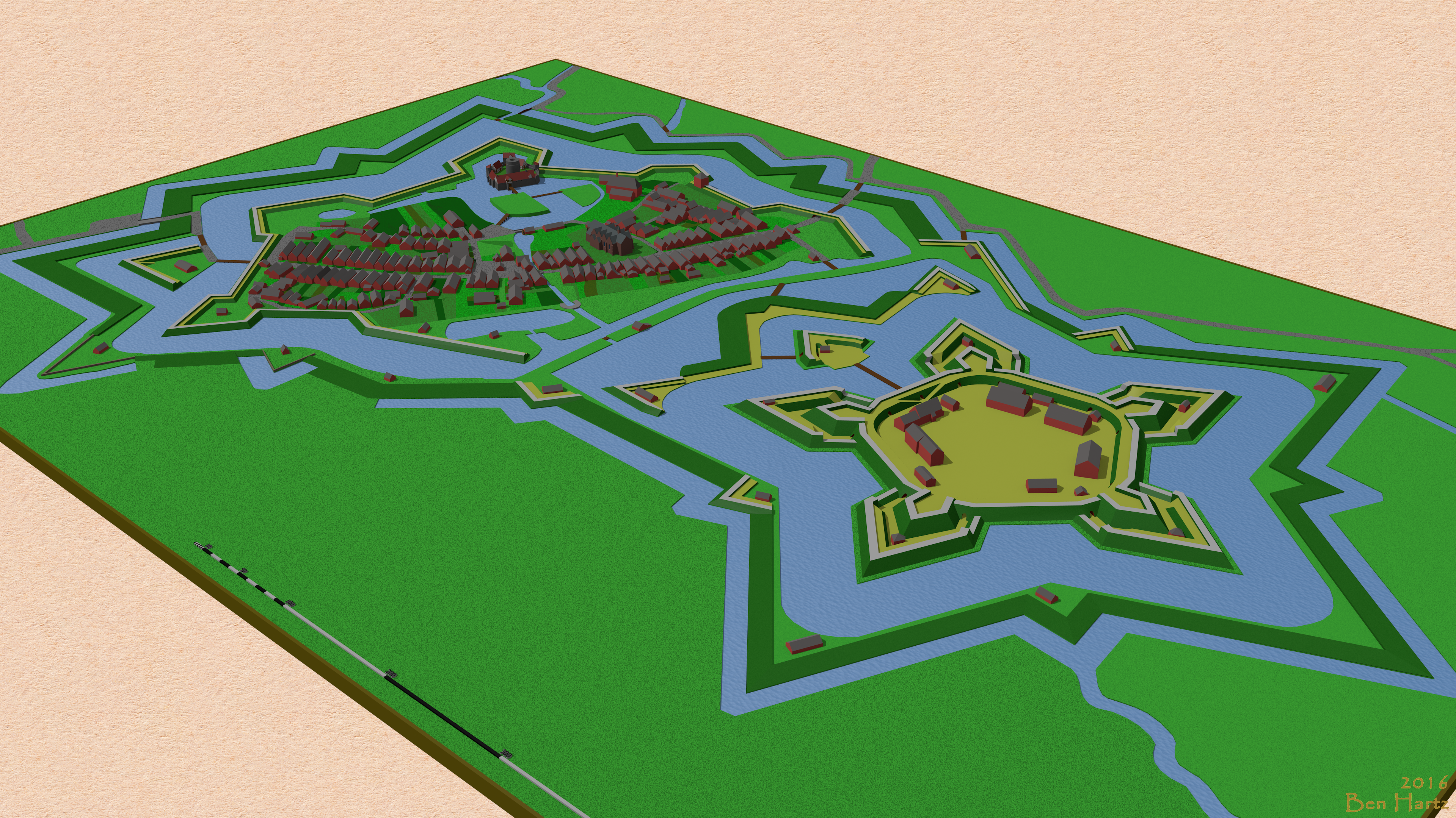 Modell der Irregulärfestung Vechta 1684 (vor dem Brand am 8.8.1684). Die Festung wurde 1666 - 1669 errichtet und umgab (zivile) Stadt und (militärische) Zitadelle. (Modellvorlage ist der 1685 erstellten Pläne der Brandzerstörung und weiteren Bauplanung.)